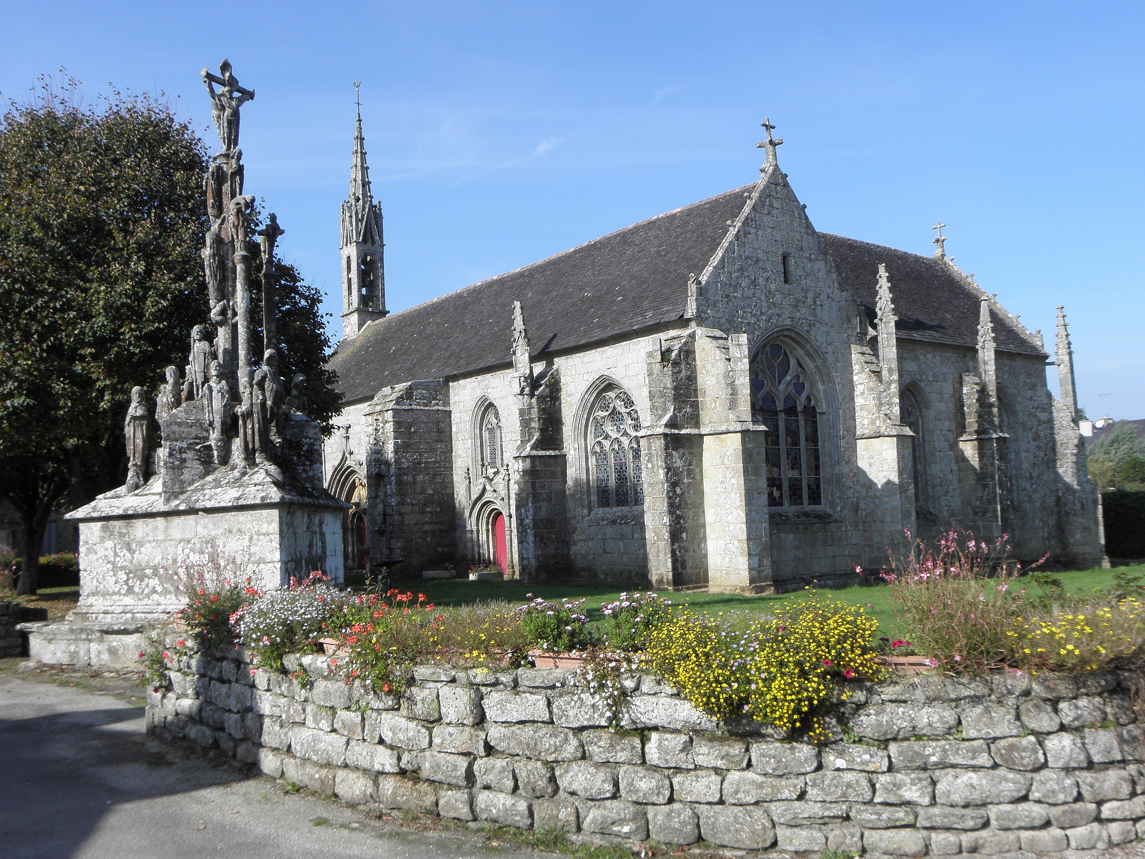 Calvaire et chapelle Notre-Dame de Quilinen en Landrévarzec (29).